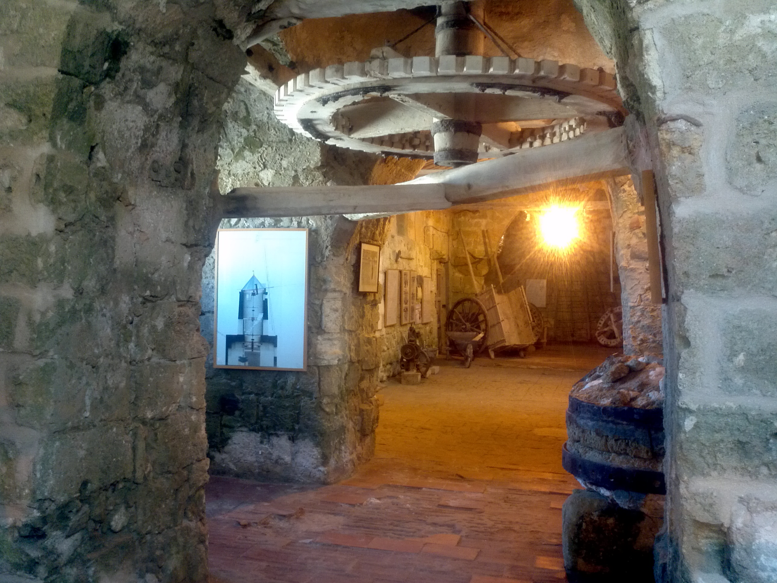 Mühlenmuseum Trapani, unter dem Mühlrad